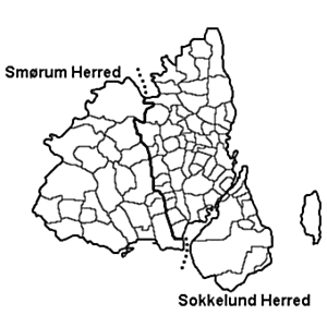 København Amt before 1808, Denmark. Map by Svend-Erik Christiansen